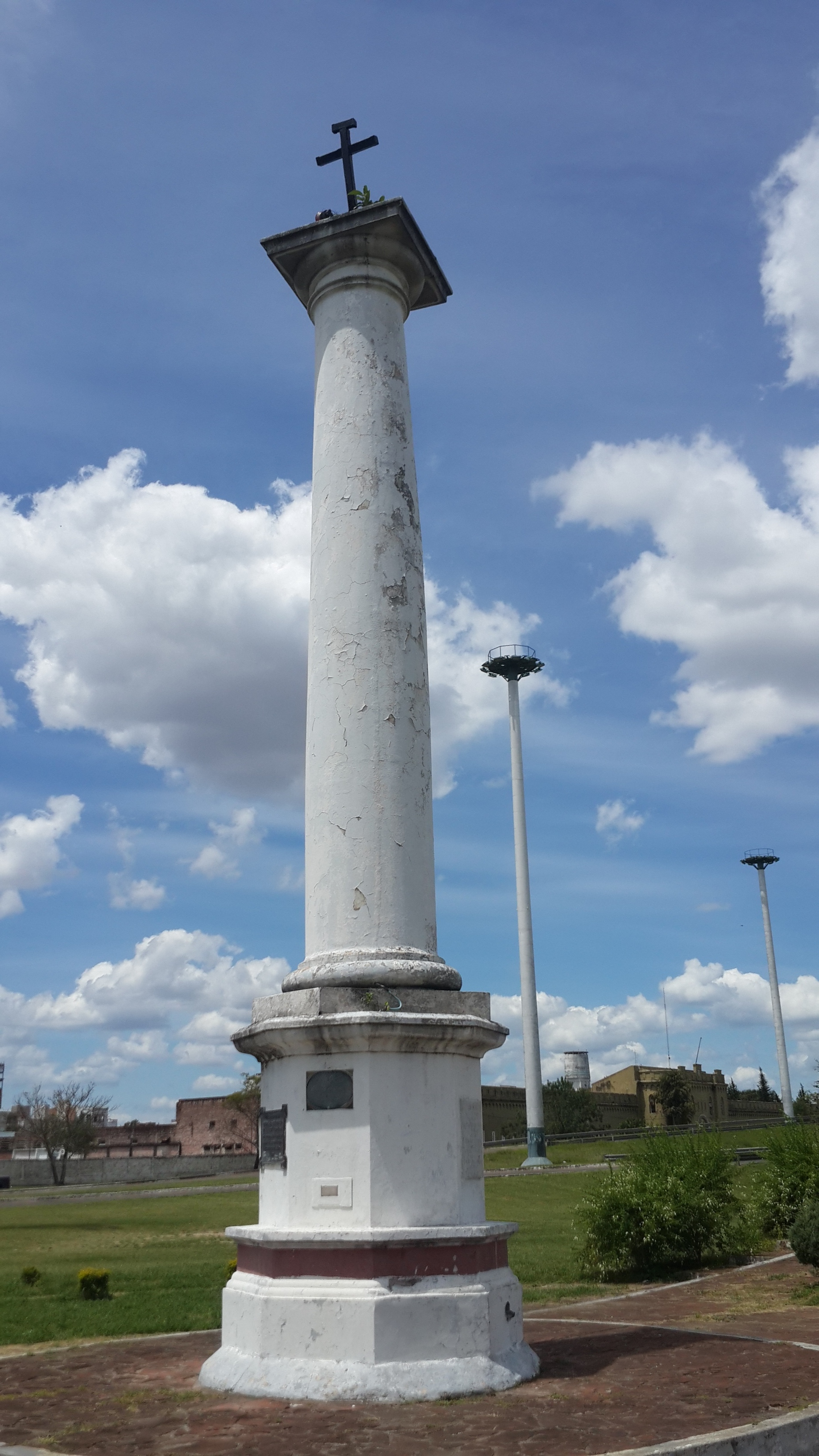 La ciudad de Corrientes fue fundada el 3 de abril de 1588.